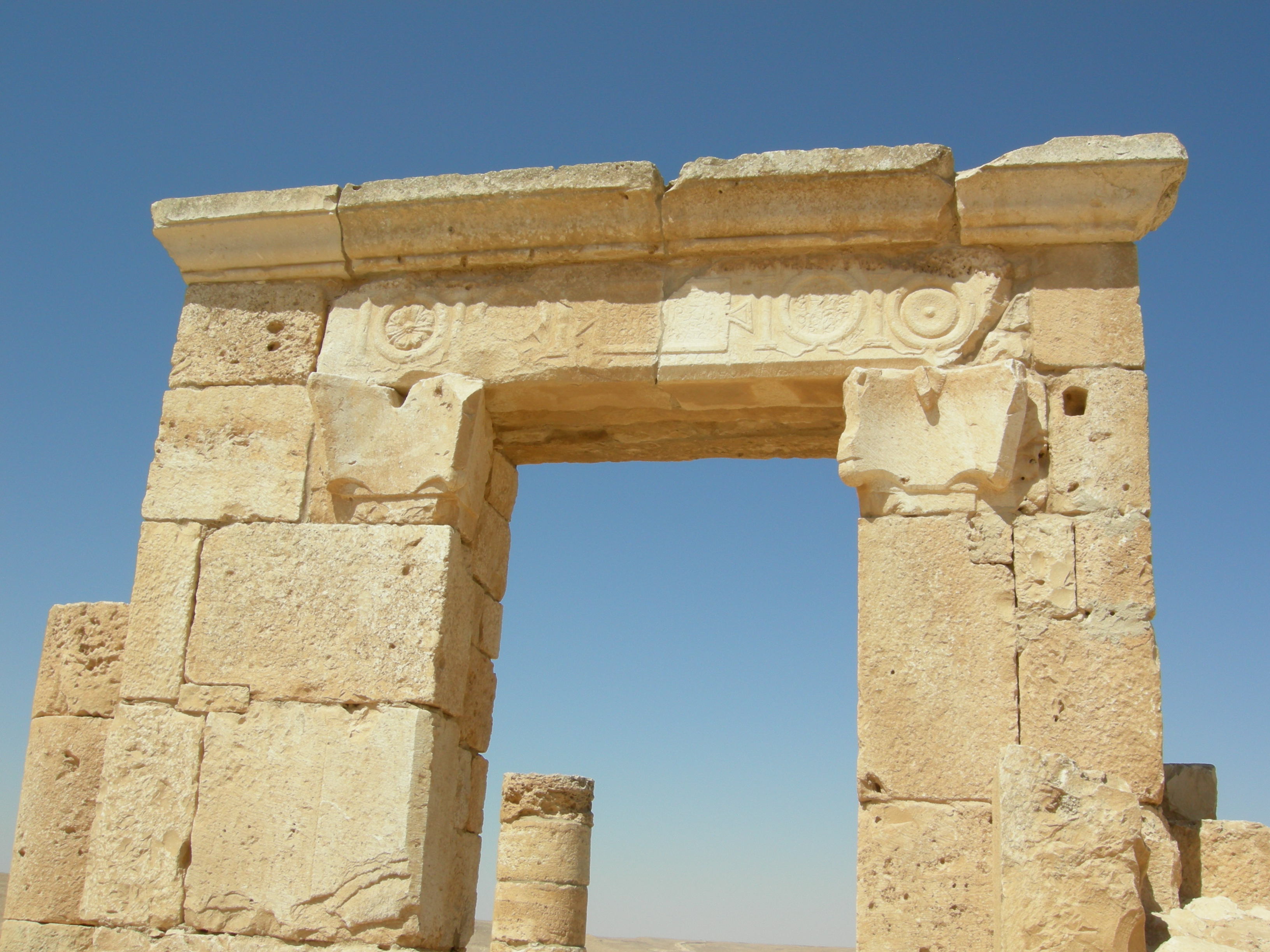 Avdat